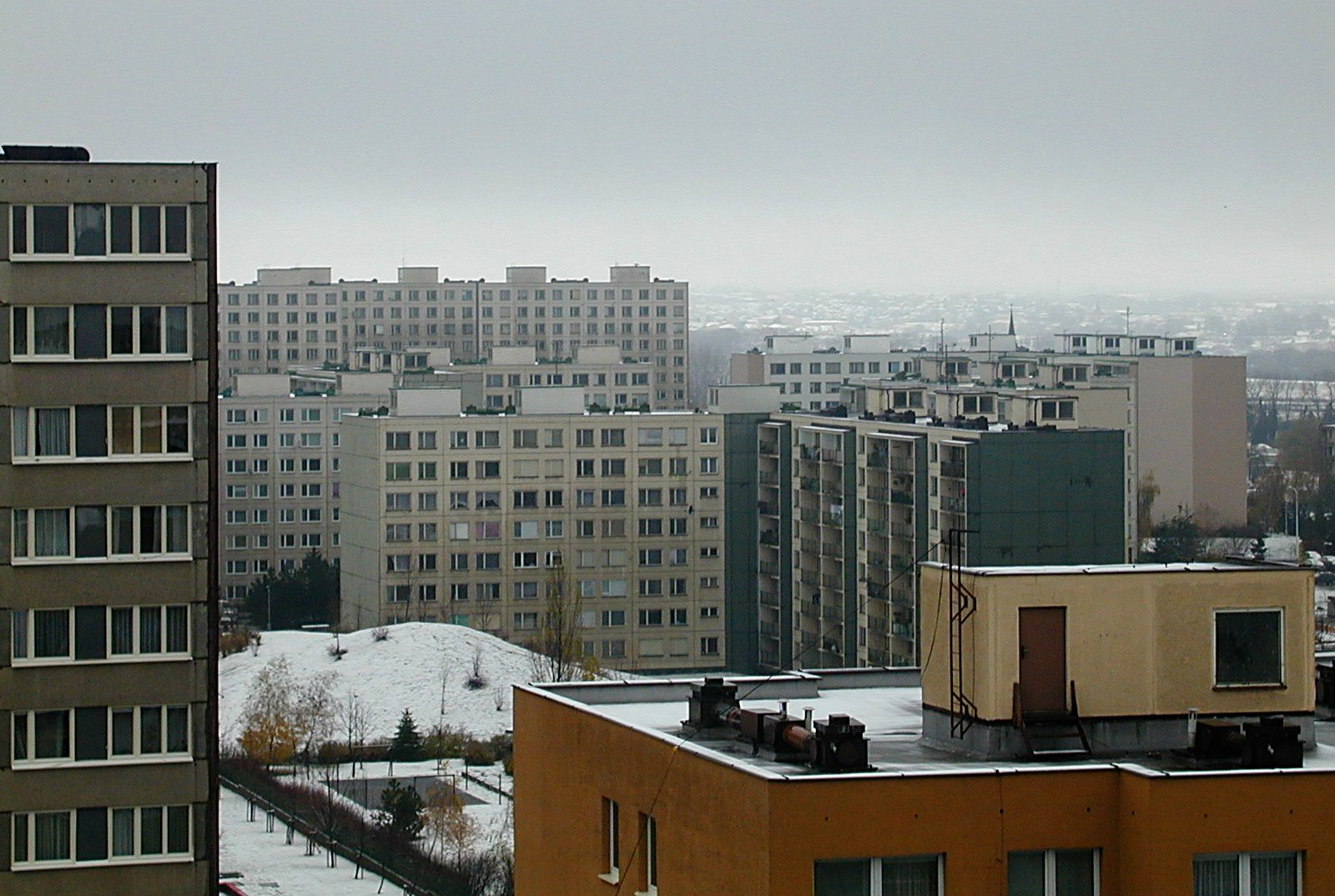 Panelákový obzor na pražském sídlišti Řepy.